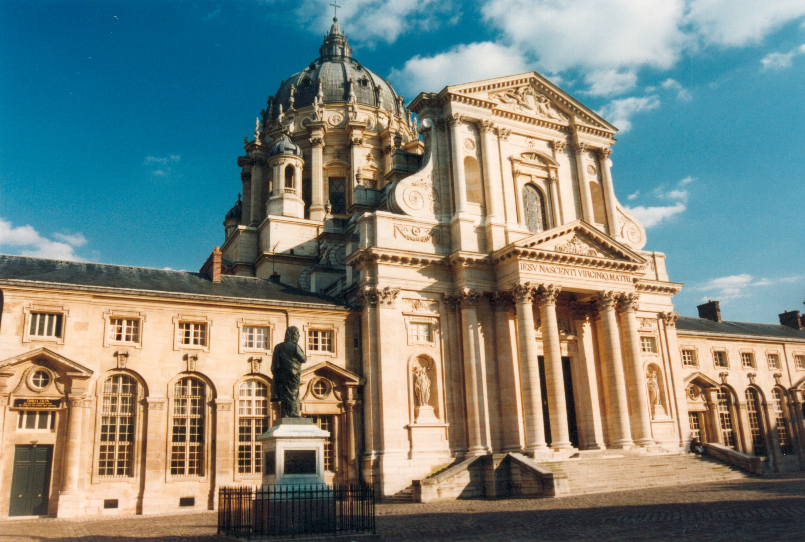 Paris Église du Val-de-GrâcePhotographie prise par GIRAUD Patrick